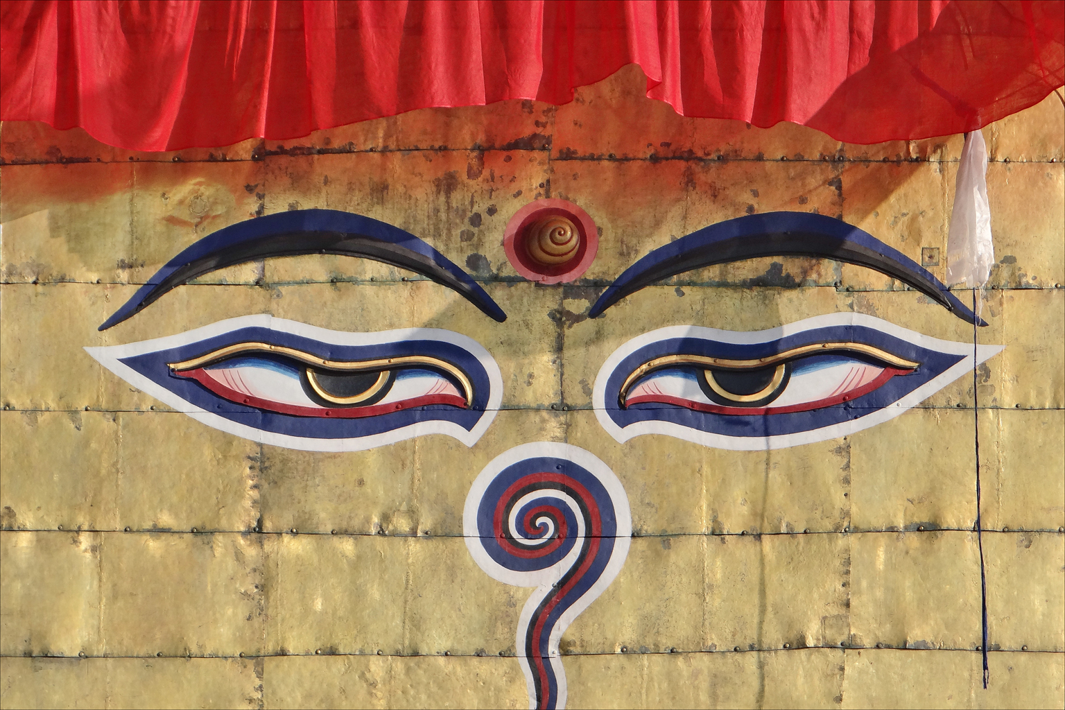 Le temple bouddhique de Swayambhunath (appelé également Temple des singes en raison des macaques rhésus qui y vivent) est un site classé au patrimoine mondial de l'UNESCO. Il domine la ville de Katmandou et il est célèbre pour son grand stupa dont le bloc cubique qui soutient la flèche est orné du regard du Bouddha sur chacune de ses faces. Le signe à l'emplacement du nez est le chiffre Un (Ek) en népali, qui est le symbole de l'unité de toute vie. Entre les yeux, le troisième oeil représente la clairvoyance du Bouddha.